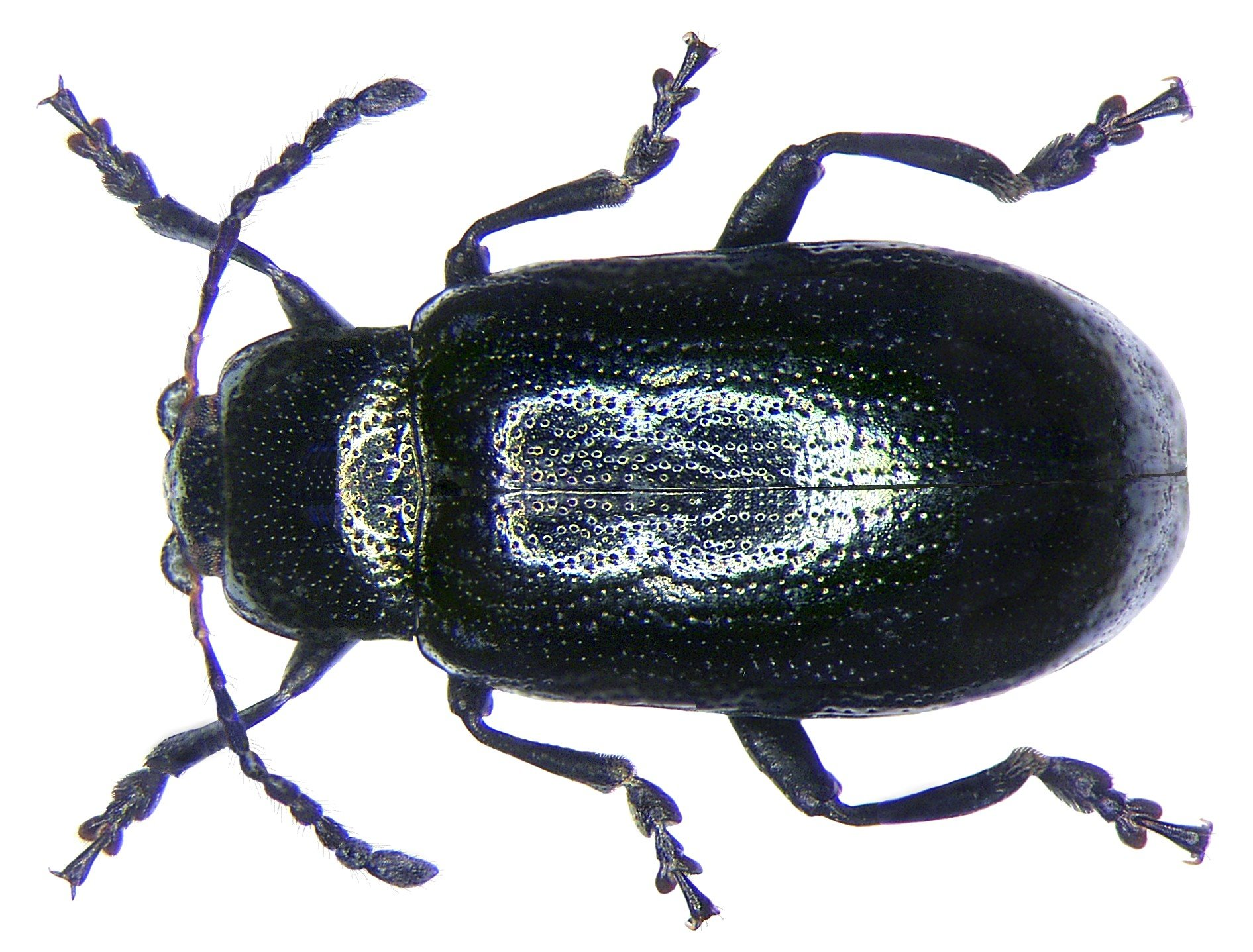 Familie: Chrysomelidae Groesse: 4-5 mm Fundort: Germania, Bayern, Oberpfalz, Pressath leg. det. G.Uhmann, 1971 Photo: U.Schmidt, 2005